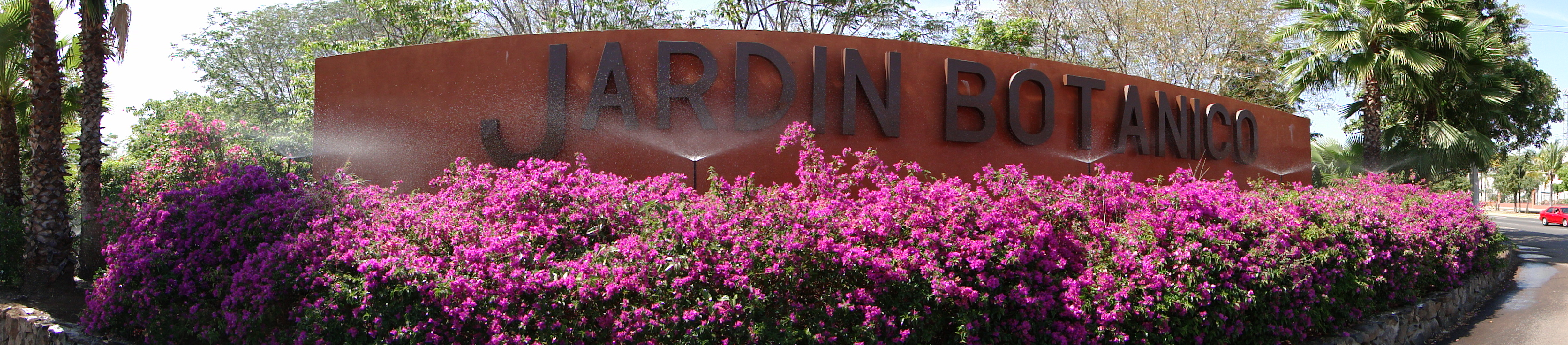 Jardin botánico de culiacán